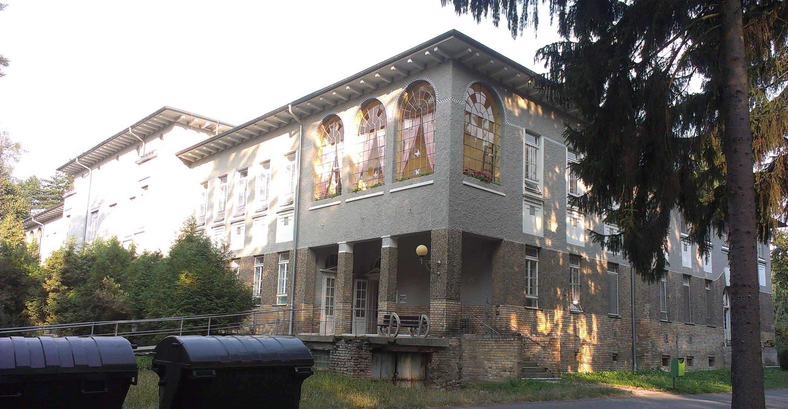 Psychiatrická léčebna, Havlíčkova 1265/50, Kroměříž. Pavilon 21 - dětské oddělení